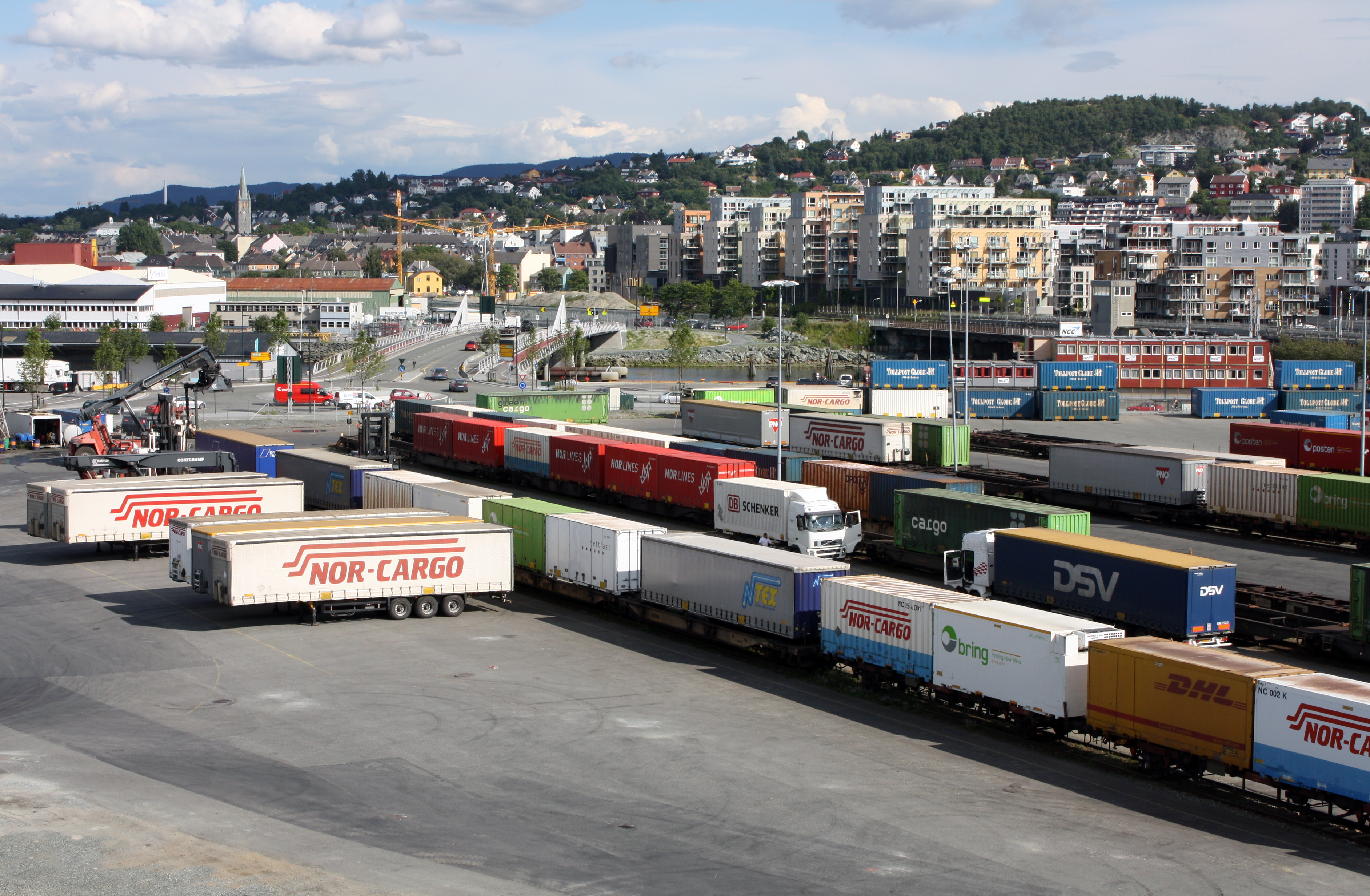 Jernbaneterminalen på Brattøra i Trondheim. Utsikt fra Rockheim.